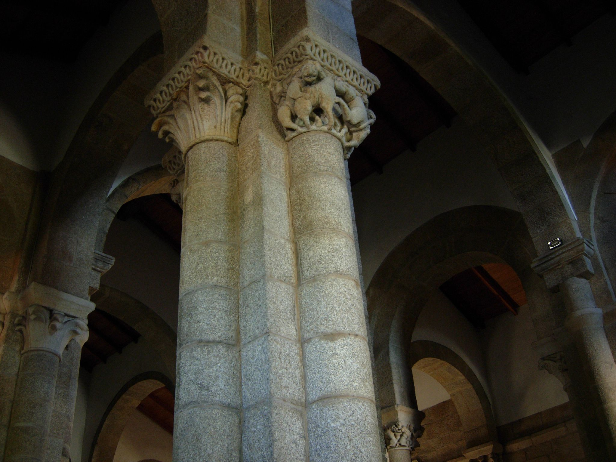 Un dos 94 capiteles decorados da Igrexa de Santa María de Cambre - Cambre - A CoruñaIglesia de Santa María de Cambre